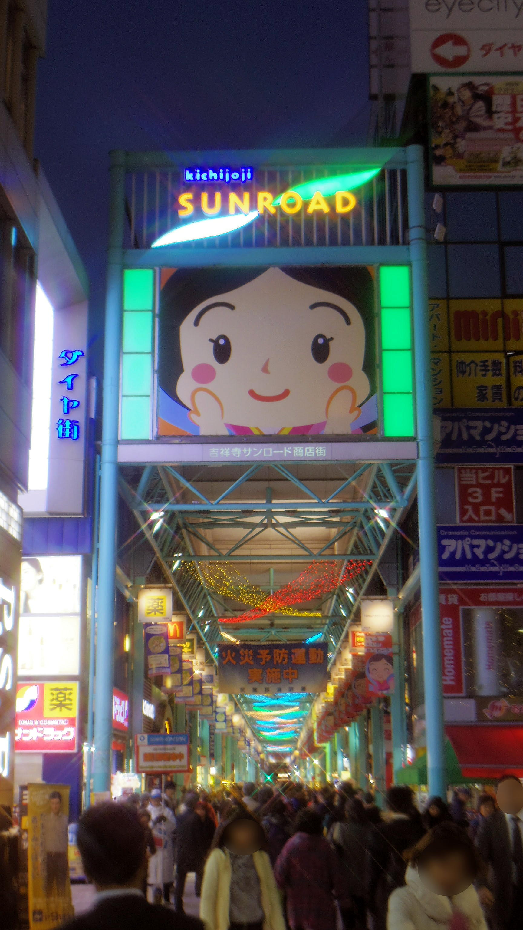 吉祥寺サンロード商店街のアーケード入口。 2016年11月9日、東京都武蔵野市・JR吉祥寺駅前にて撮影。